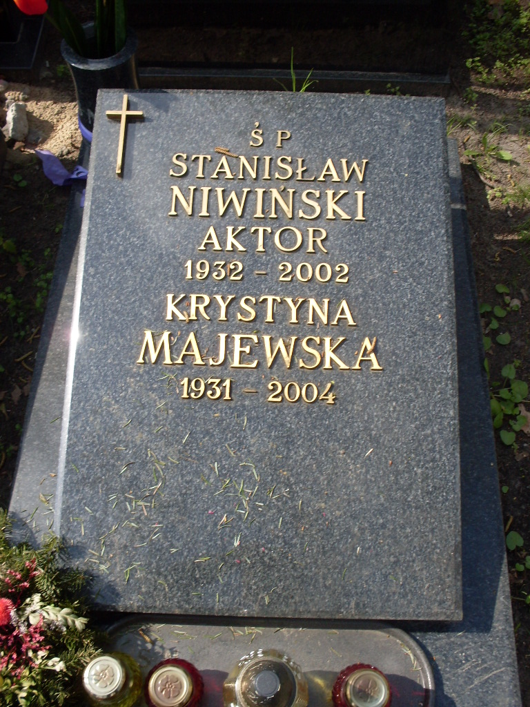 Nagrobek Stanisława Niwińskiego na powązkach